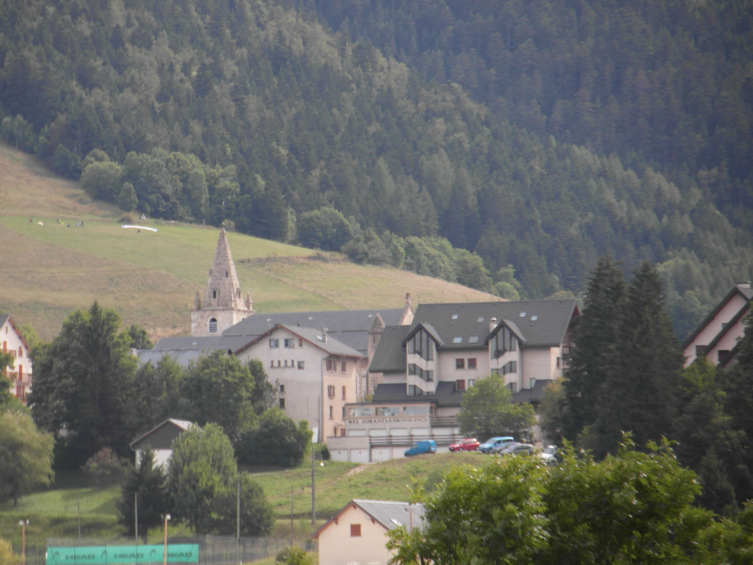 Village